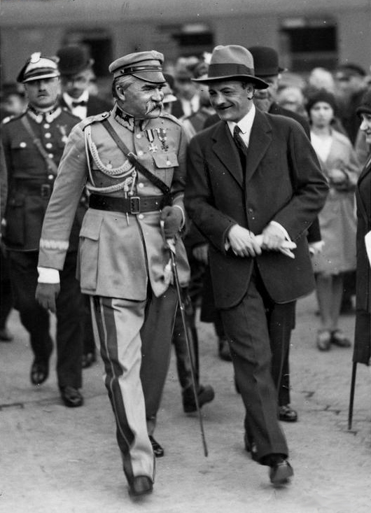 Józef Piłsudski with Kazimierz Świtalski in Warsaw